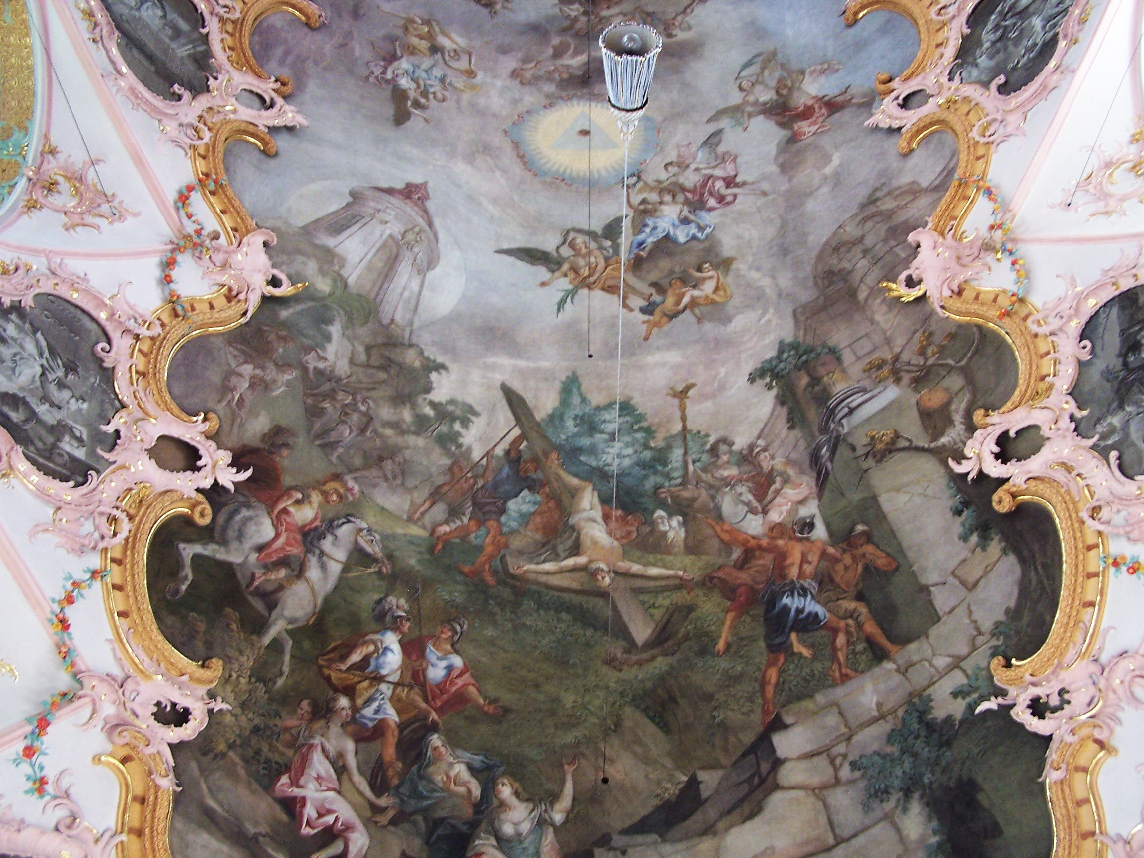 Geiselhöring, Schlossgraben 17. Katholische Stadtpfarrkirche St. Petrus und Erasmus. Barockes Langhaus, 1761-64 von Georg Fischer. Das große Fresko im Langhaus von Matthäus Günther von 1765 zeigt die Kreuzigung des Apostels Petrus.